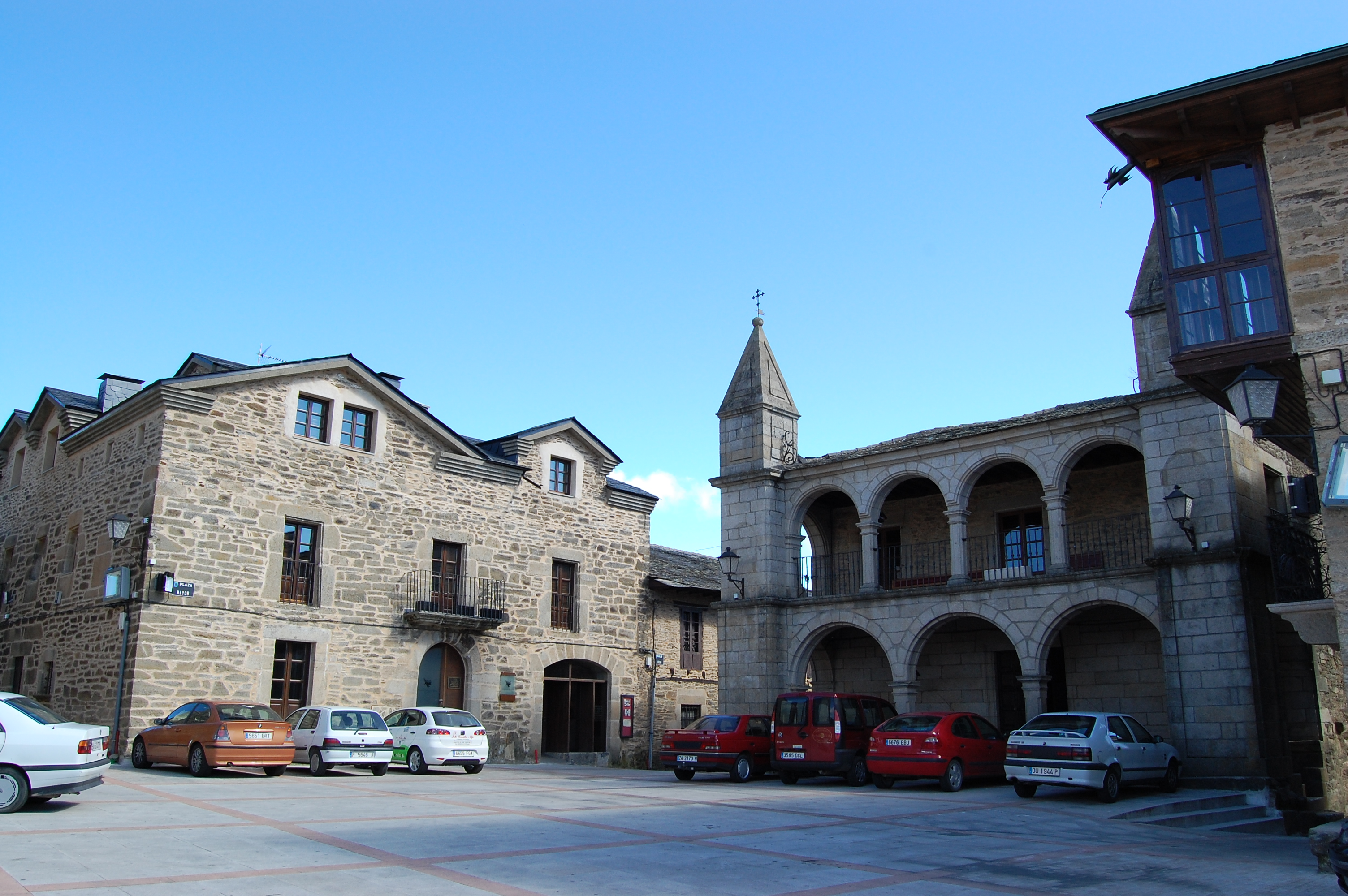 Puebla de Sanabria (Póvoa de Seabra), província de Zamora, Espanha.